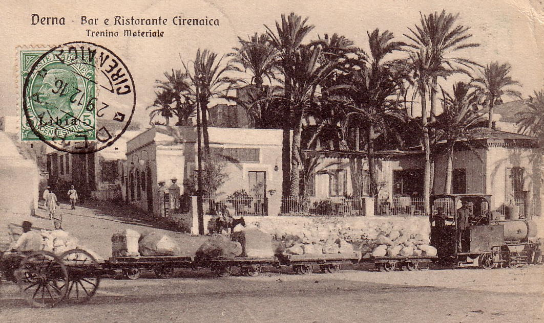 Derna - Bar e Ristorante Cirenaica - Trenio Materiale (stamped on 29 Dec 1916)